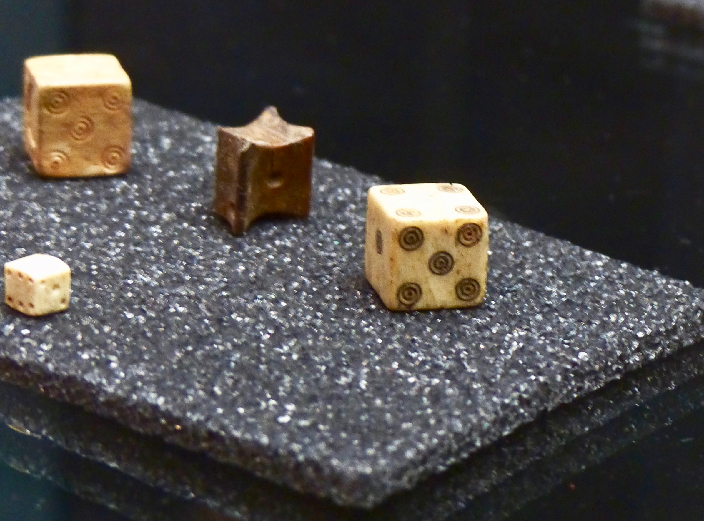 Auftaktveranstaltung in Zusammenarbeit mit dem LVR am 3. Dezember 2016 im Praetorium in Köln: mittelalterliche Würfel